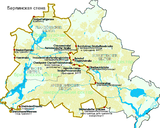 Берлинская стена и граница Западного Берлина до 1989 года